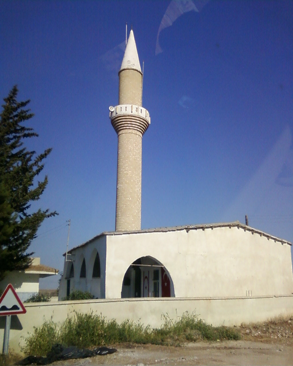 Taşpınar Camii (Kıbrıs)